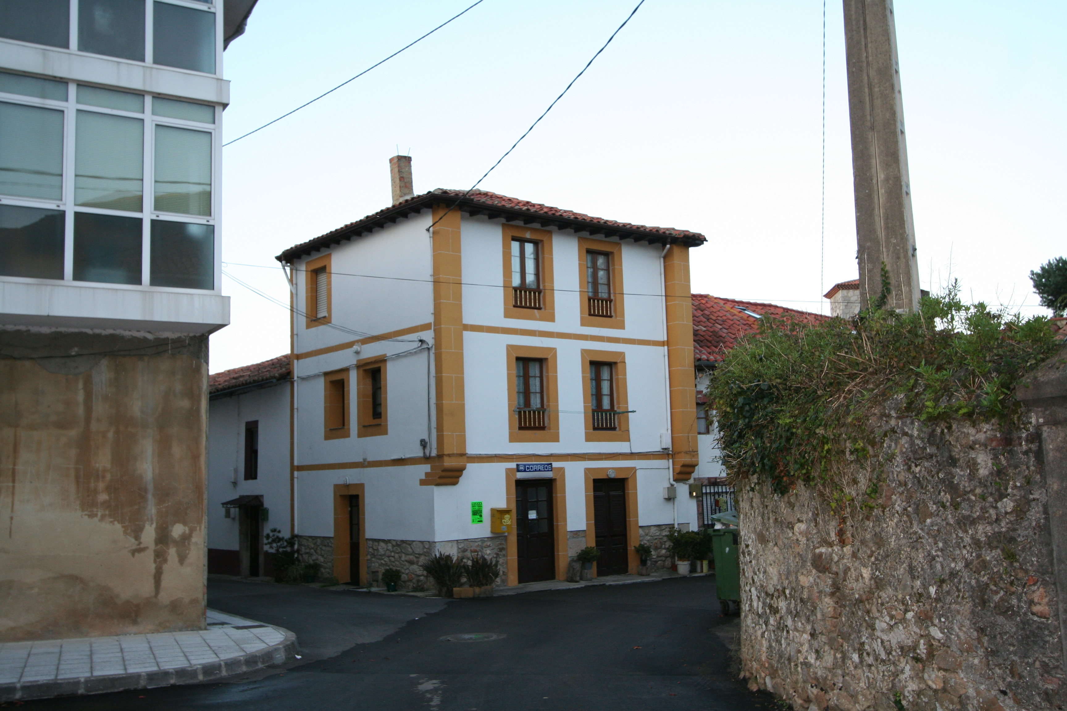 Casona en Nueva de Llanes